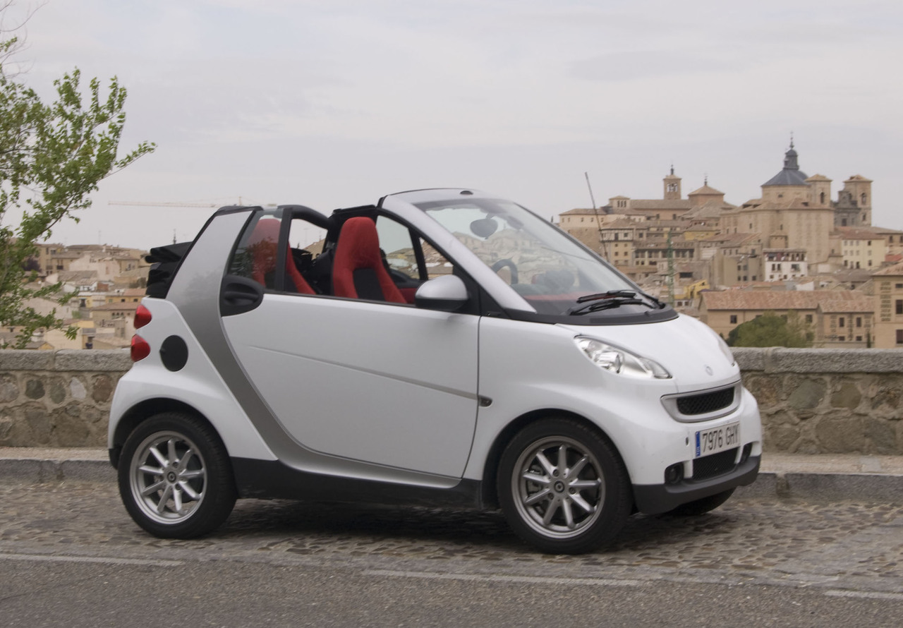 Prueba del Smart fortwo 52 mhd cabrio. Prueba en Historias del Motor